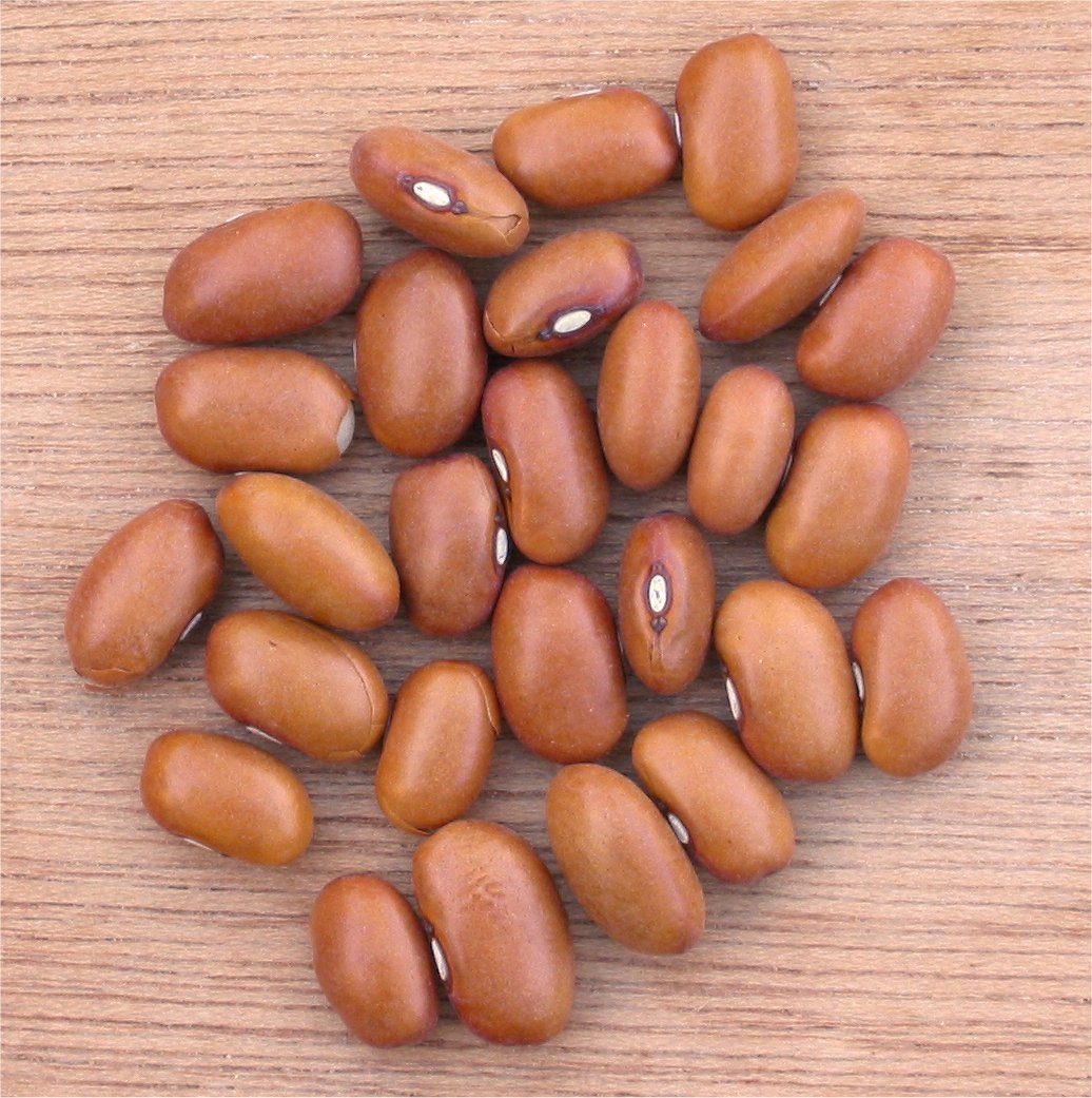 (Bruine boon 'Noordhollandse Bruine') Phaseolus vulgaris 'Noordhollandse Bruine'